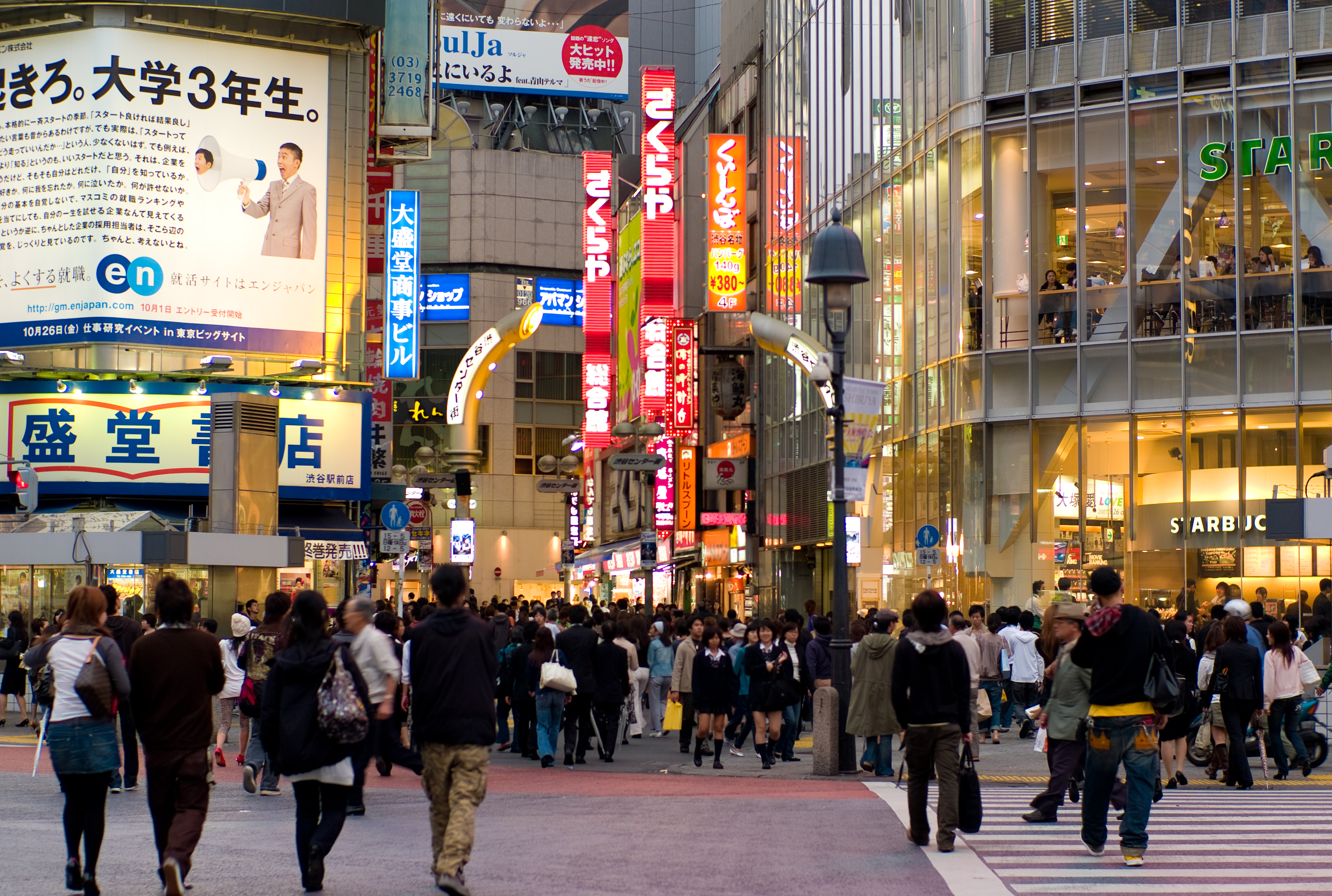 Center Gai, Shibuya, Tokyo